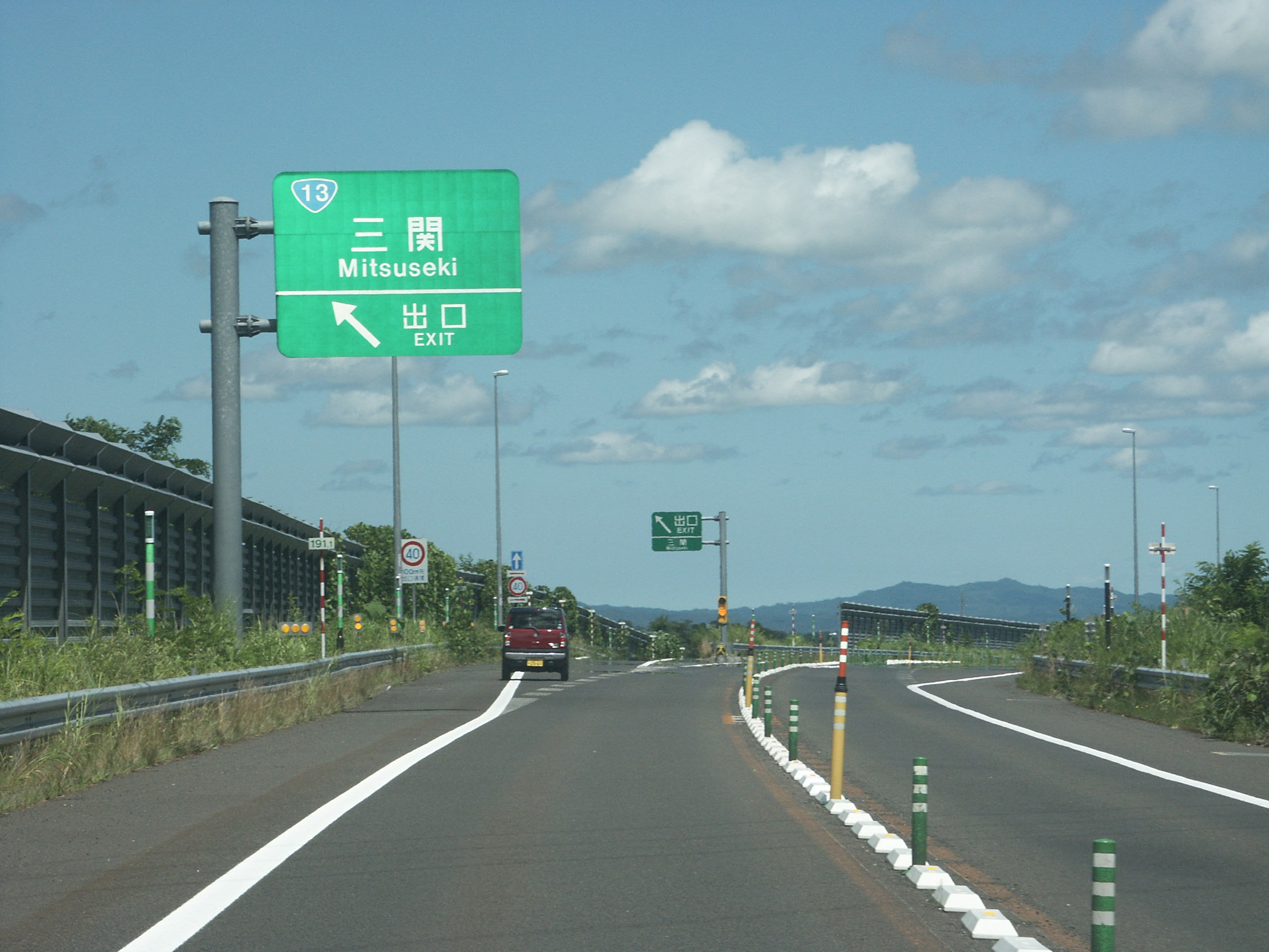 東北中央自動車道（湯沢横手道路）三関IC出口（雄勝こまちIC方面側）